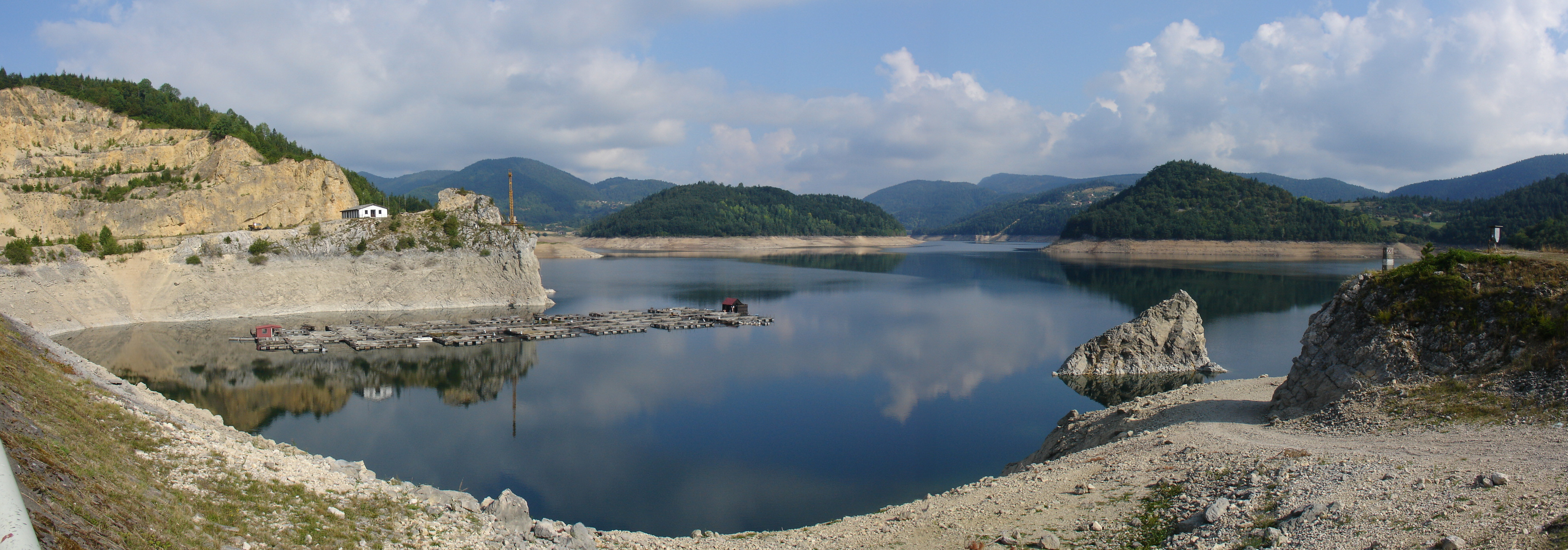 Le lac artificiel de Zaovine, Serbie